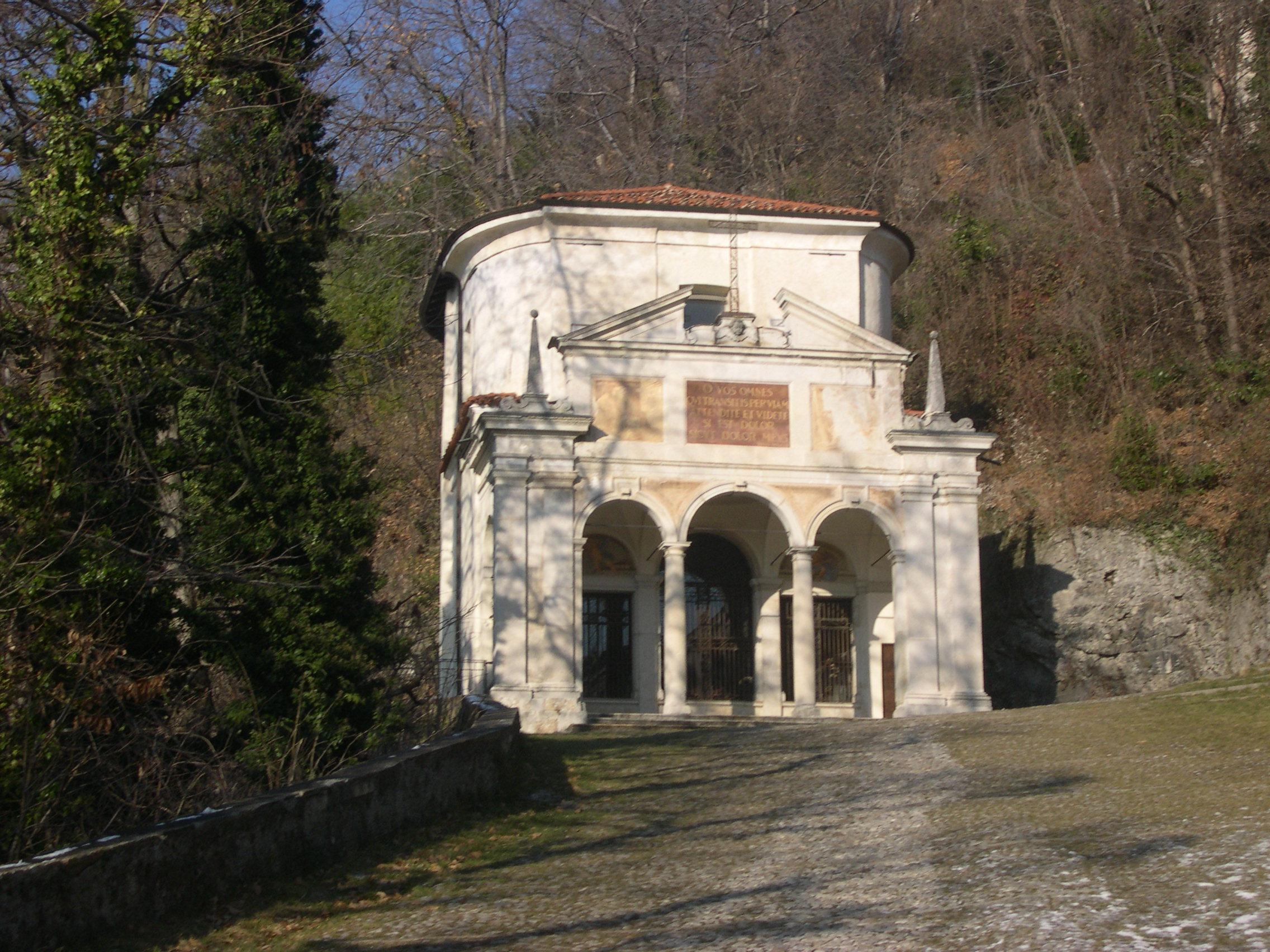 Chapel X of Sacro Monte (Varese)